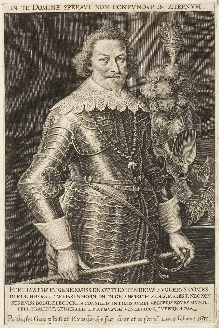 Grafik aus dem Klebeband Nr. 1 der Fürstlich Waldeckschen Hofbibliothek Arolsen Motiv: Otto Heinrich Fugger, kurbayerischer Heerführer im Dreißigjährigen Krieg